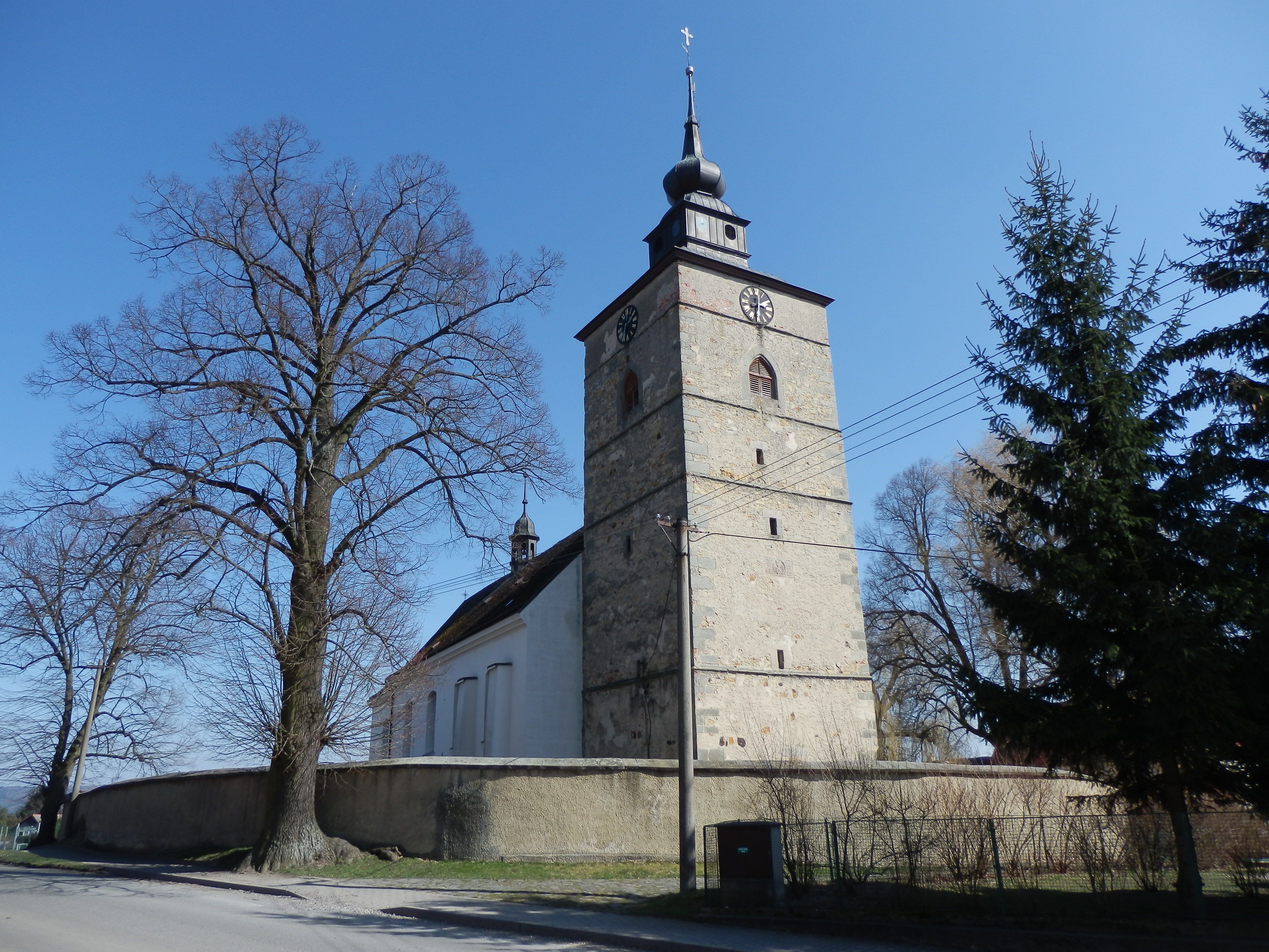 Kostel svaté Kateřiny, Staré Město (okres Svitavy).